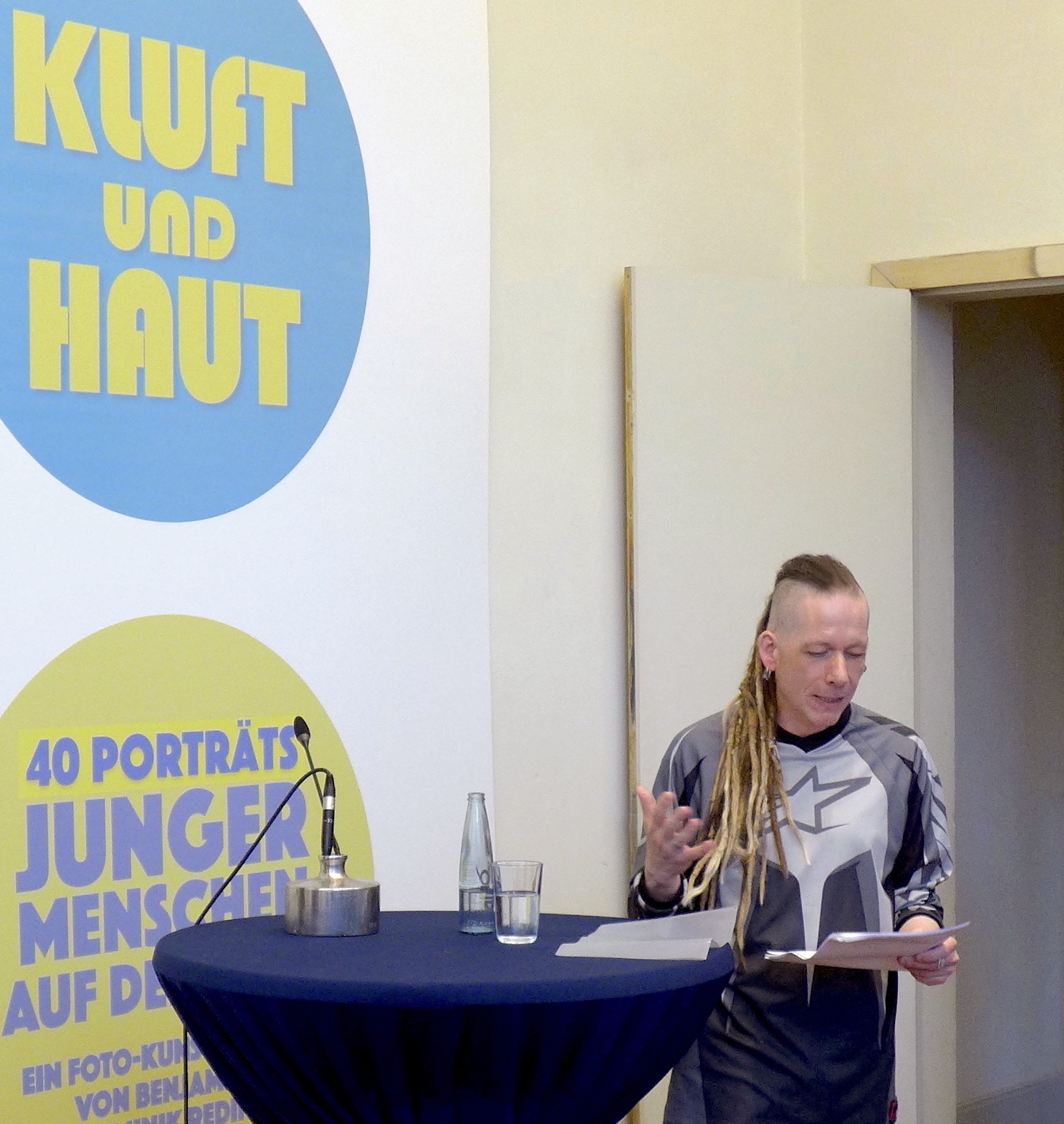 Benjamin Reding bei seiner Eröffnungsrede zur Ausstellung Kluft und Haut in der ehem. franz. Botschaft in Saarbrücken, Aug. 2019